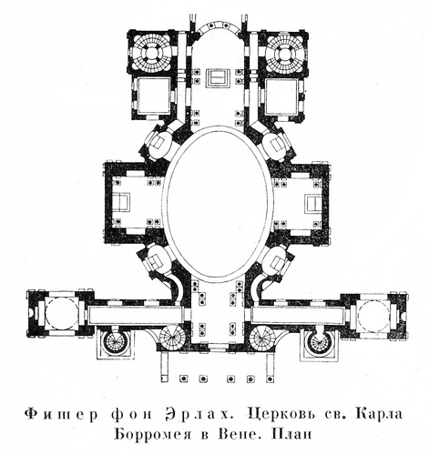 Фішер фон Ерлах. Поземний план храму СанКарло Борромео у місті Відень (варіант вже завантаженого плану)